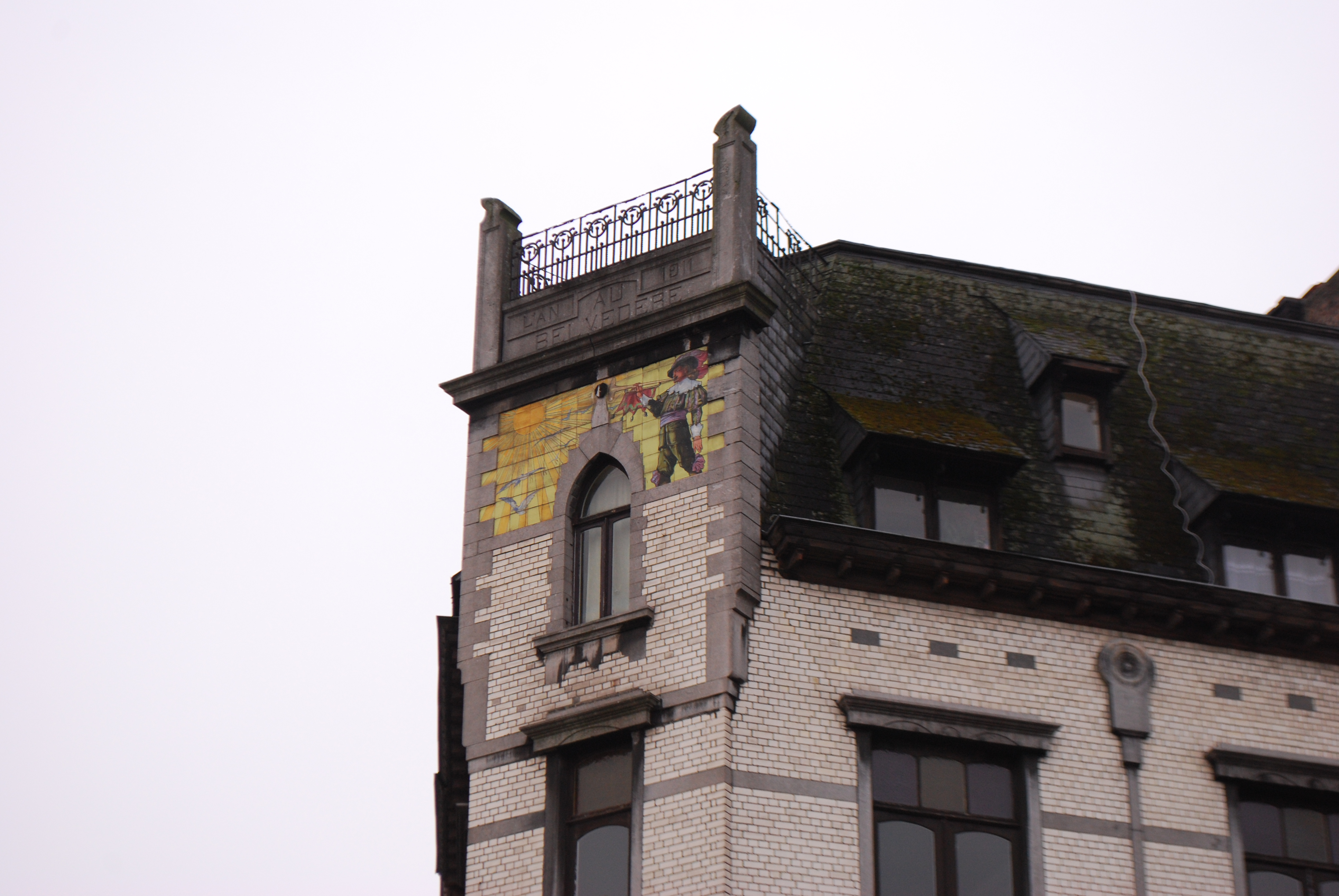 La rue Henri de Dinant, dans le quartier d'Outremeuse à Liège.